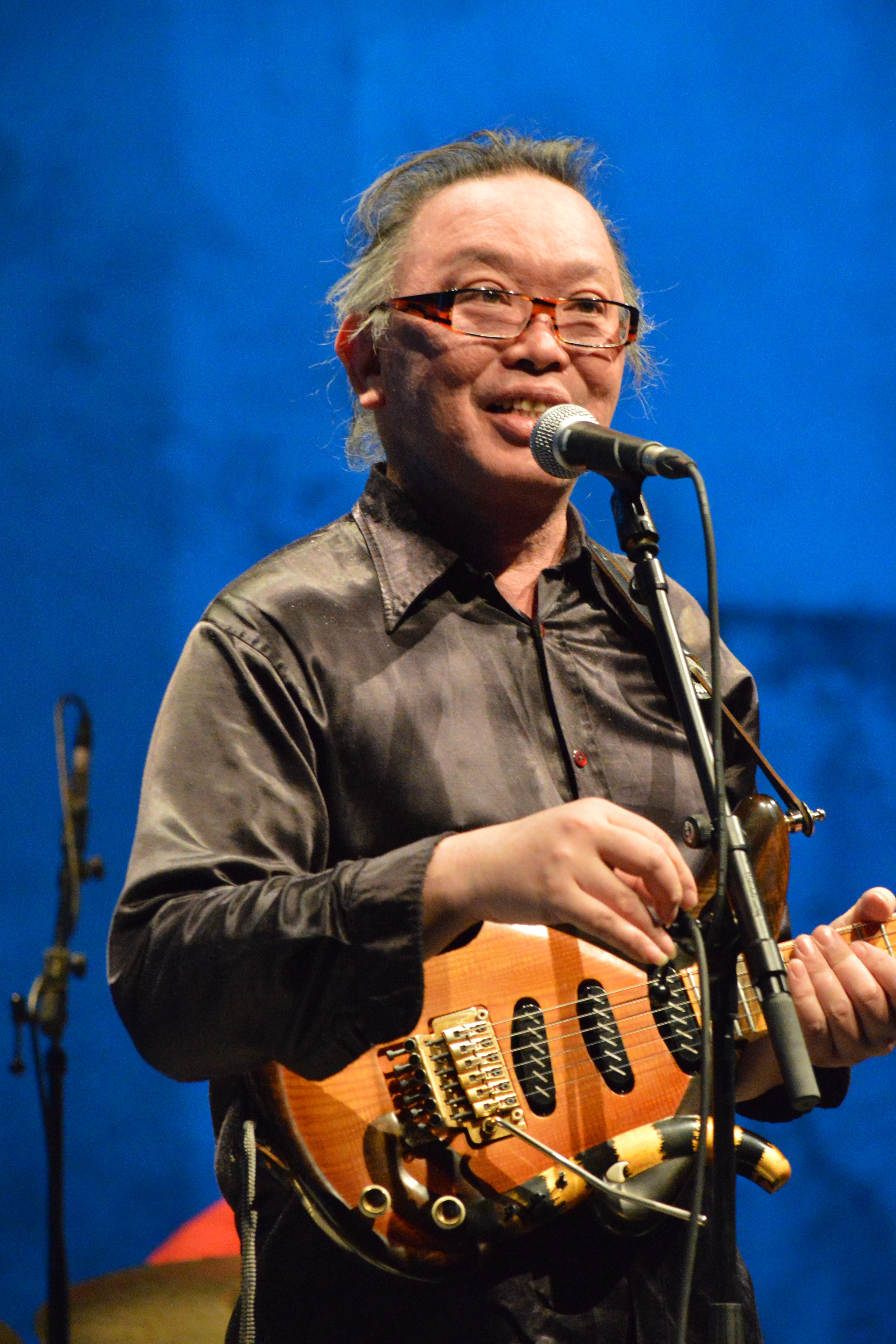 Nguyên Lê beim Traumzeit-Festival 2013